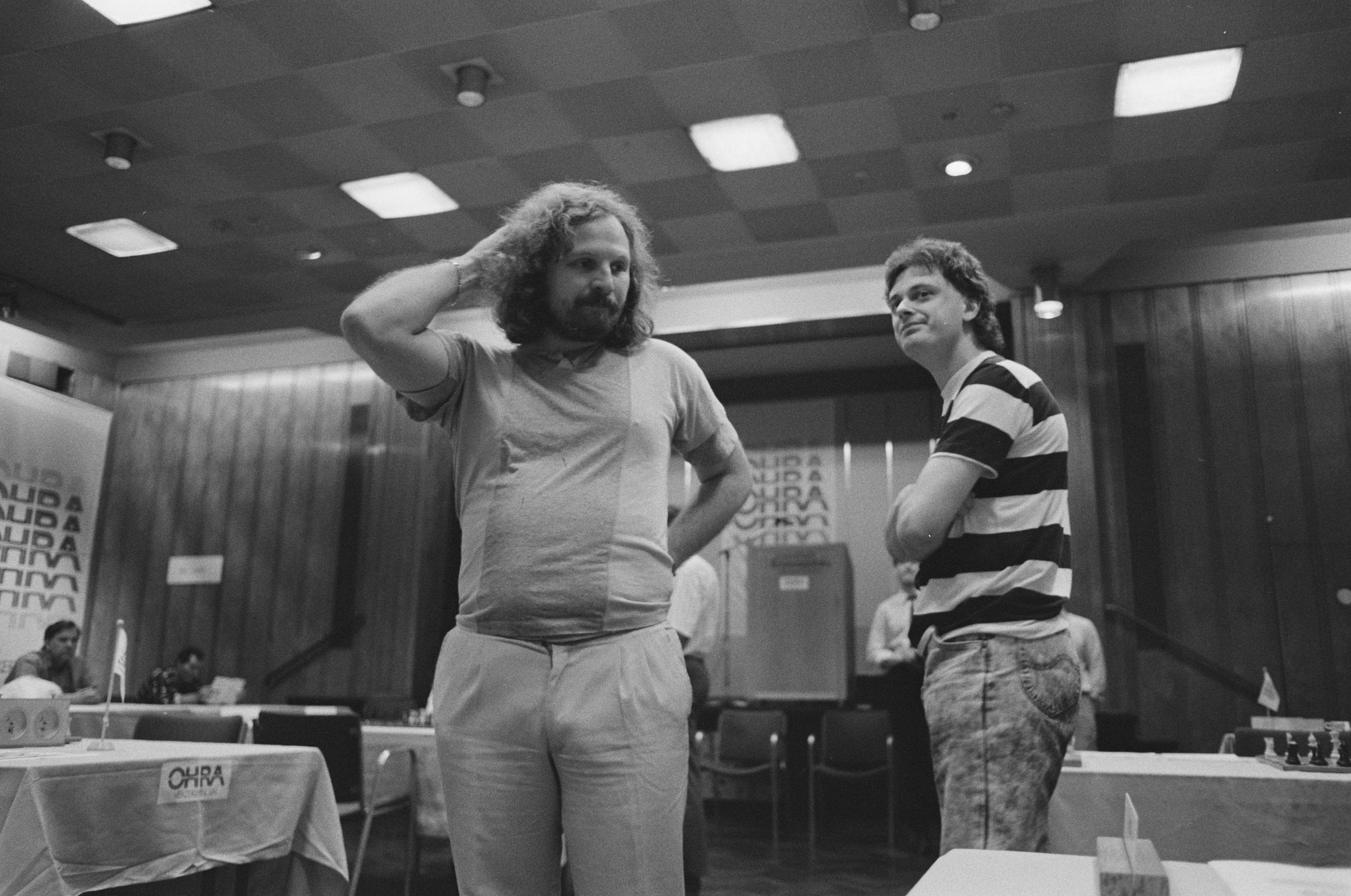 Ohra schaaktoernooi; Tony Miles (l) en John Nunn, Amsterdam, Noord-Holland 1988.